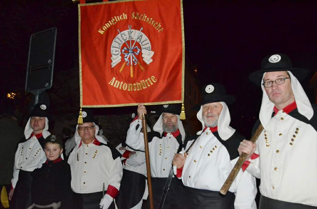 Die Hüttenknappschaft aus Antonsthal am Rande der Schwarzenberger Bergparade am 10.12.2016